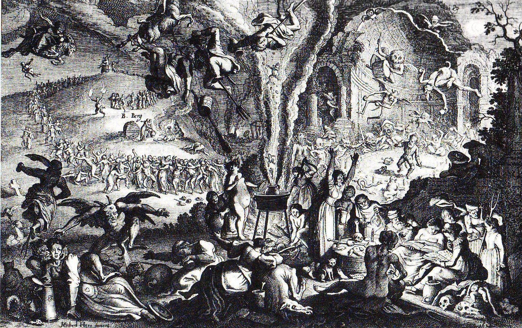 sabbat de sorcière sur le mont de Brocken (B. Berg)